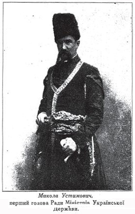 Микола Миколайович Сахно-Устимович (1863-1918 рр.) — громадський діяч, в.о. Отамана Ради міністрів Української держави.